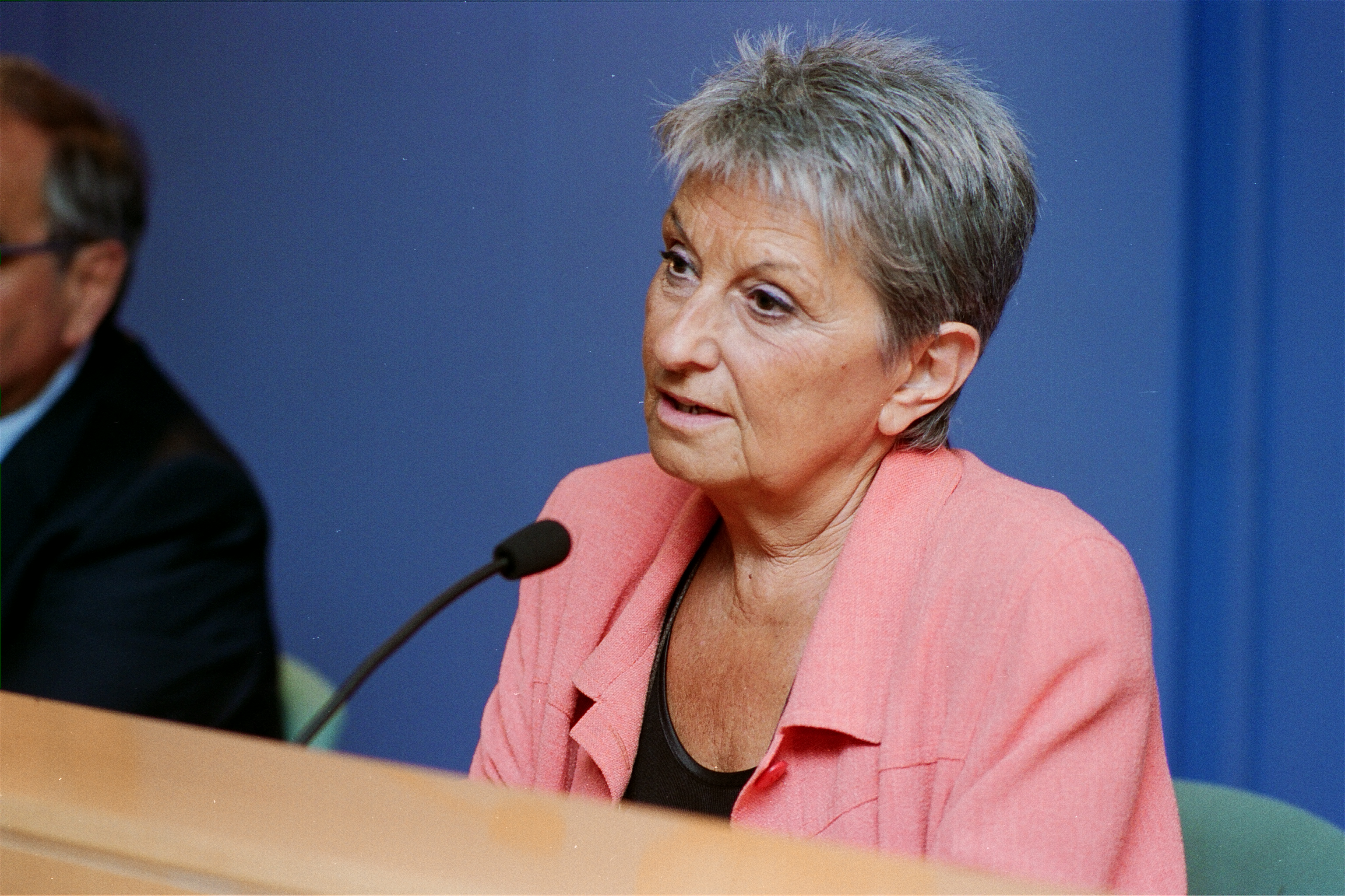 Carme Laura Gila al MHC el 2001.